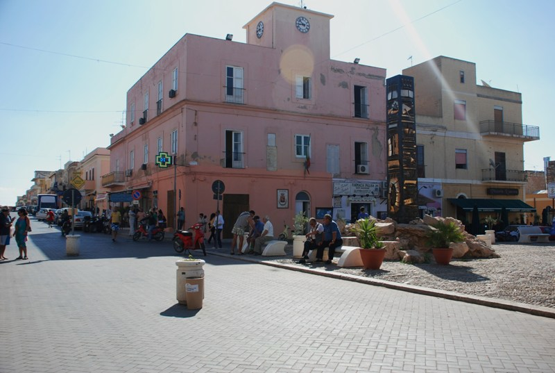 Il municipio di Lampedusa e Linosa nell'isola di Lampedusa (AG) in Sicilia.